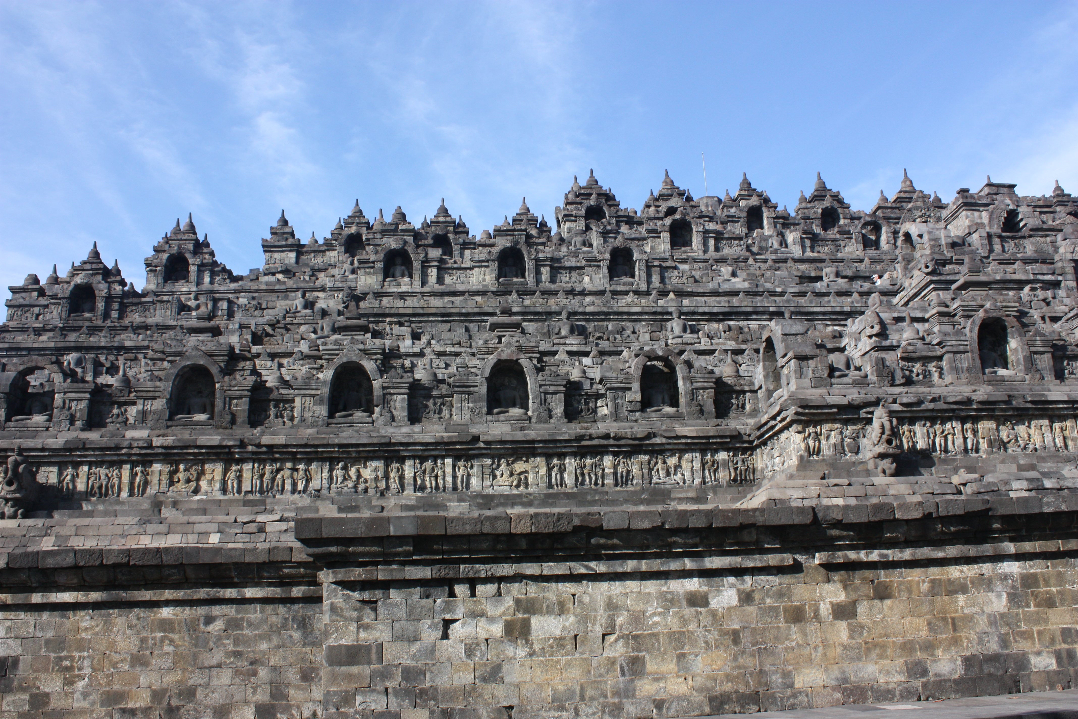 Borobudur